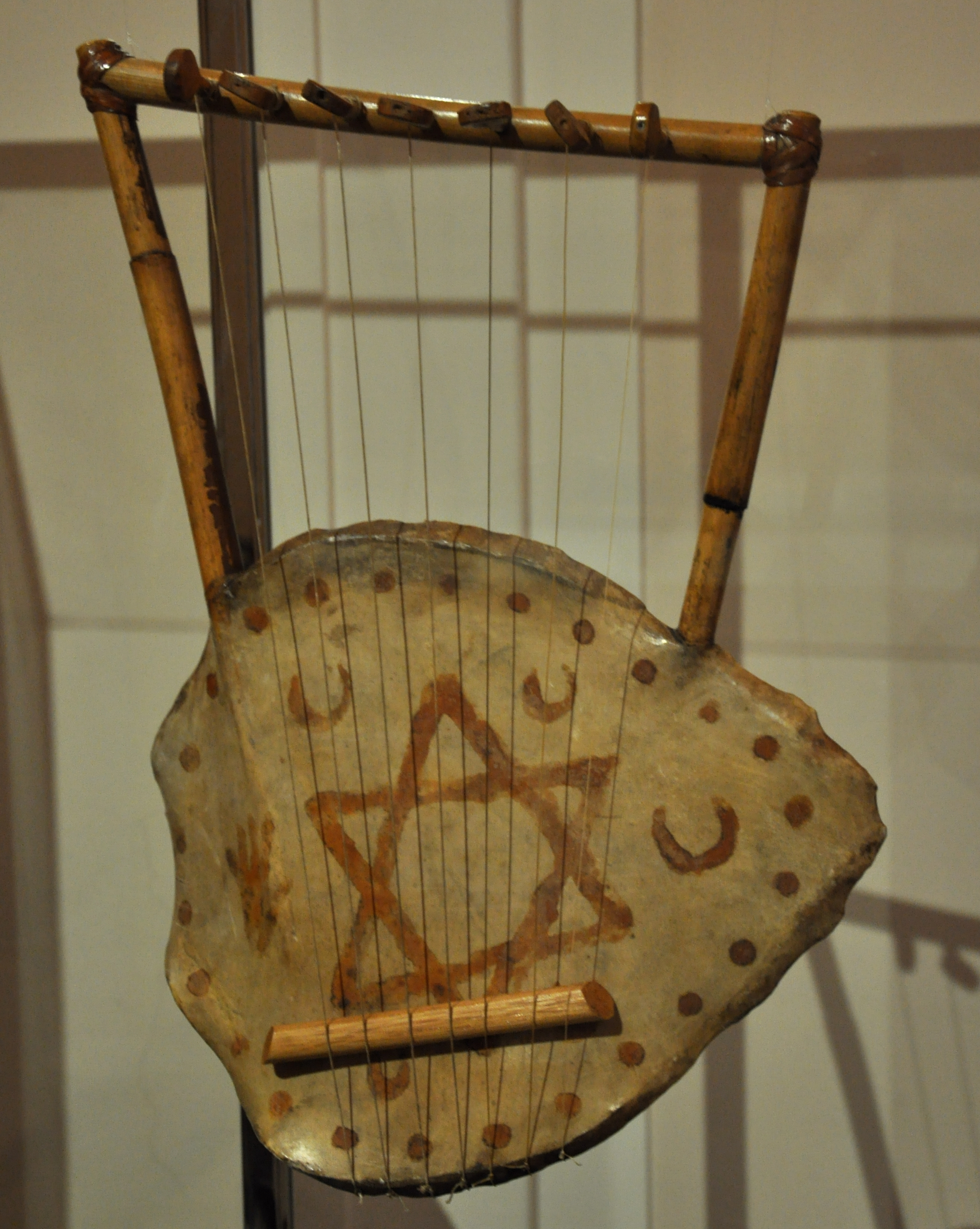 Wien, Kunsthistorisches Museum, Sammlung alter Musikinstrumente (Neue Burg) "Kissar" (bzw. "Krar"), Ähtiopien, 19. Jh. (Schildpatt, Pergament, Rohr), Inv. Nr. SAM 9